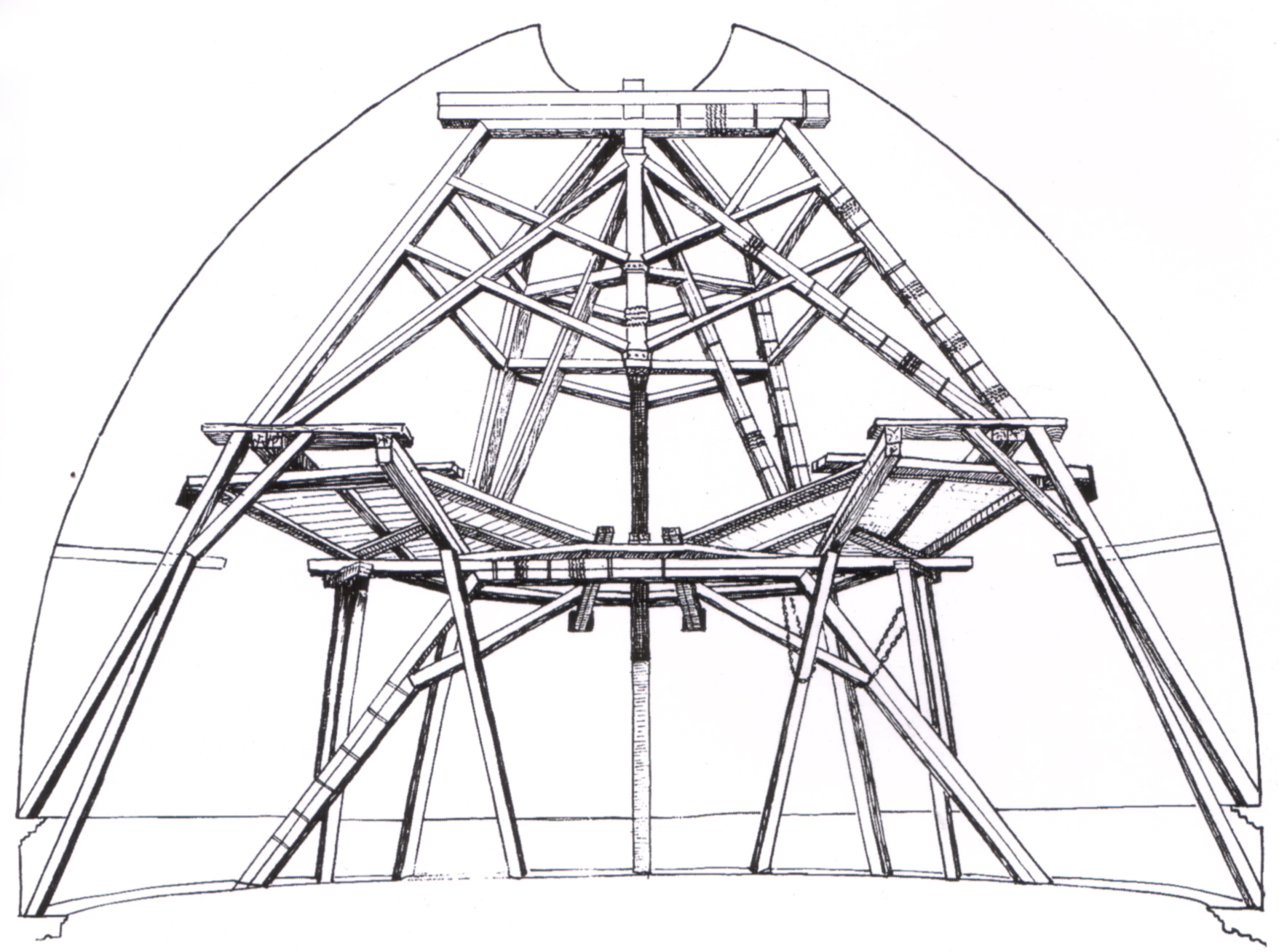 Giovan battista nelli (attr.), ricostruzione dei ponteggi interni della cupola di brunelleschi, seconda metà del XVII sec., gabinetto disegni e stampe